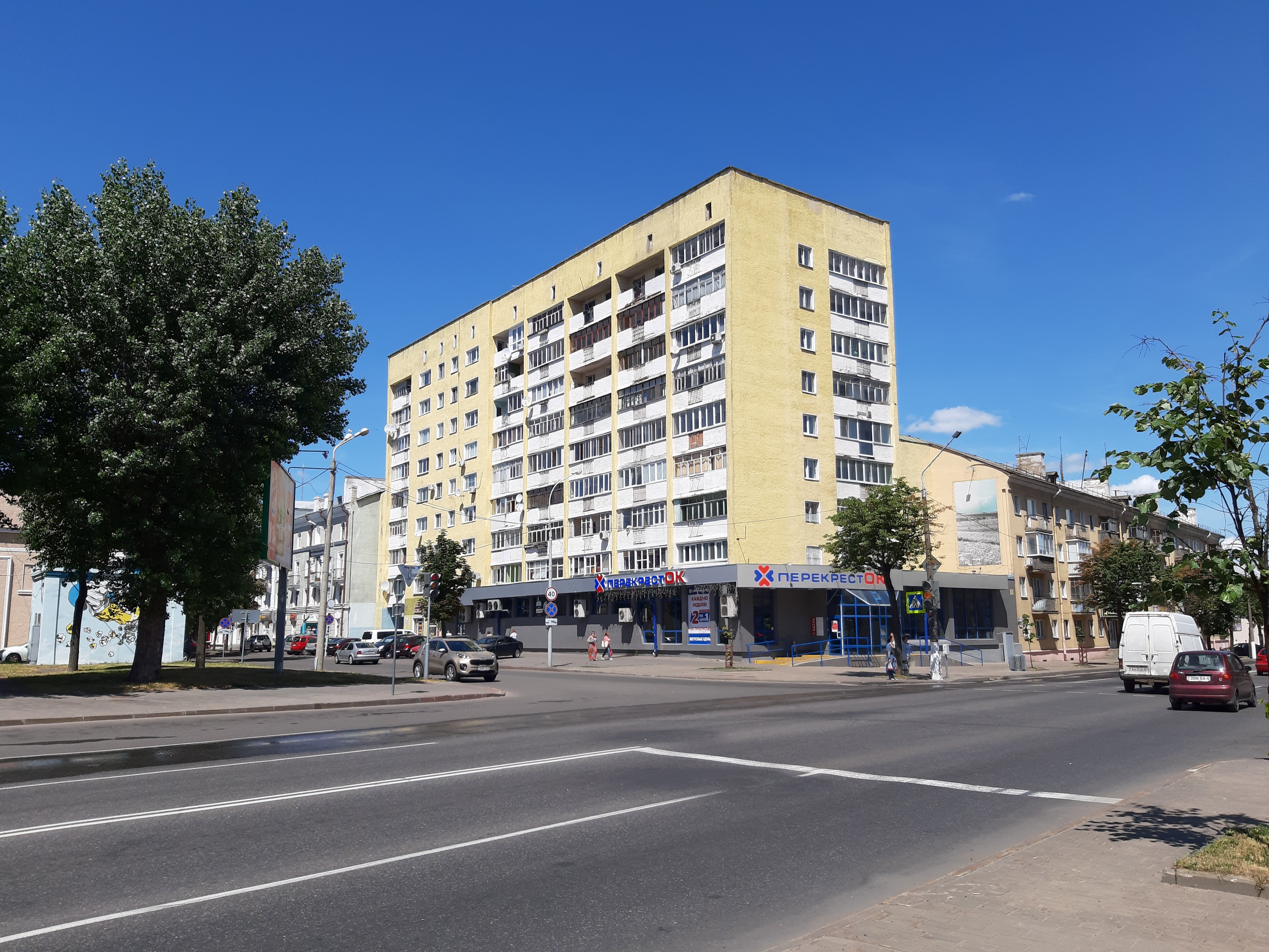 Магілёў. Скрыжаванне Піянерскай з Будзённага і Лепяшынскага